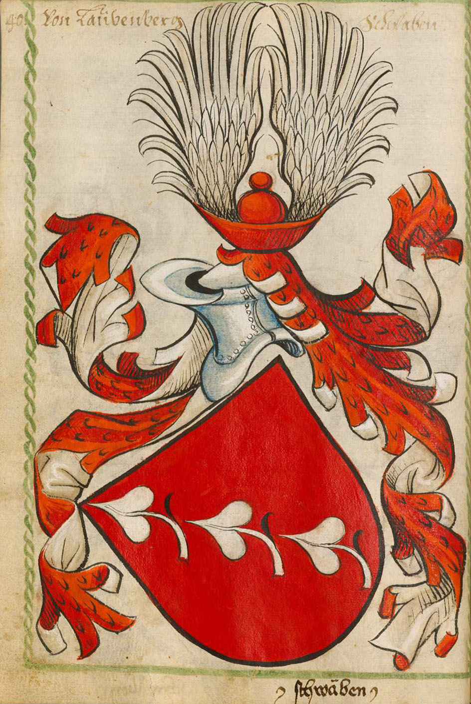 Scheibler'sches Wappenbuch, älterer Teil Laubenberg